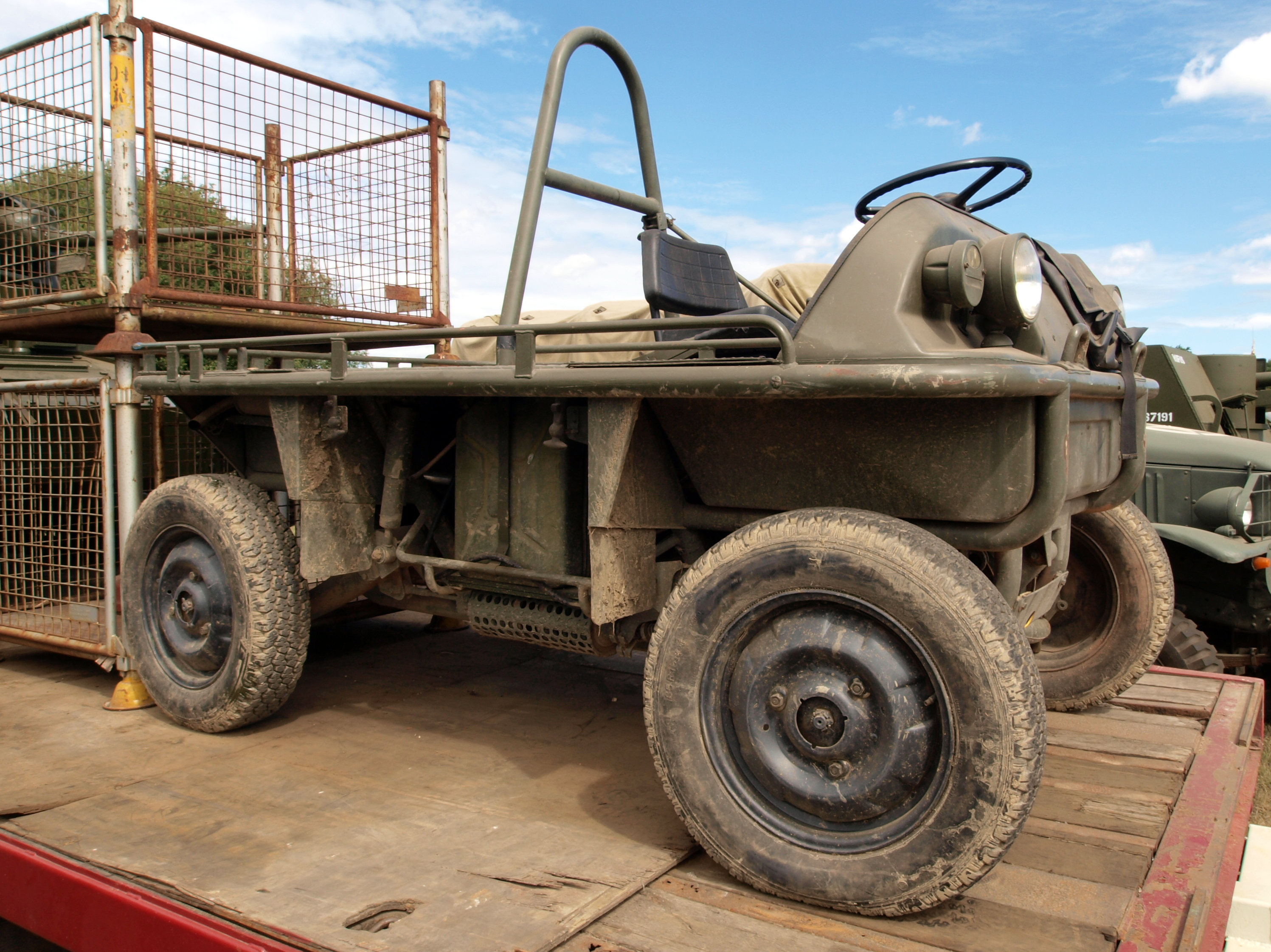 LOHR